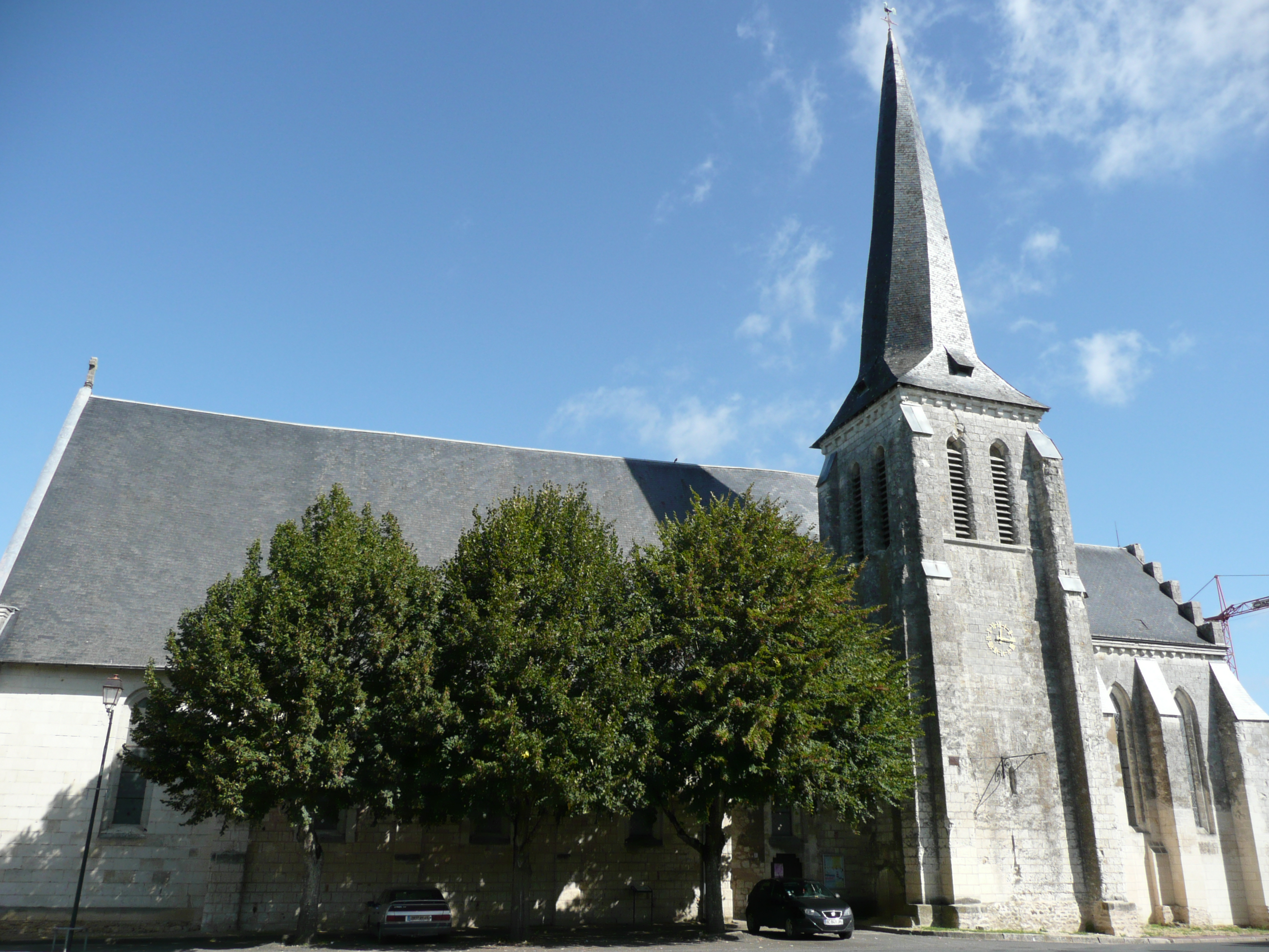 Église de Fougeré (Maine-et-Loire, France) avec clocher tors. .